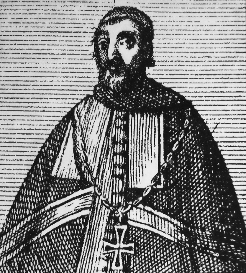 Партрэт Кіпрыяна Жахоўскага